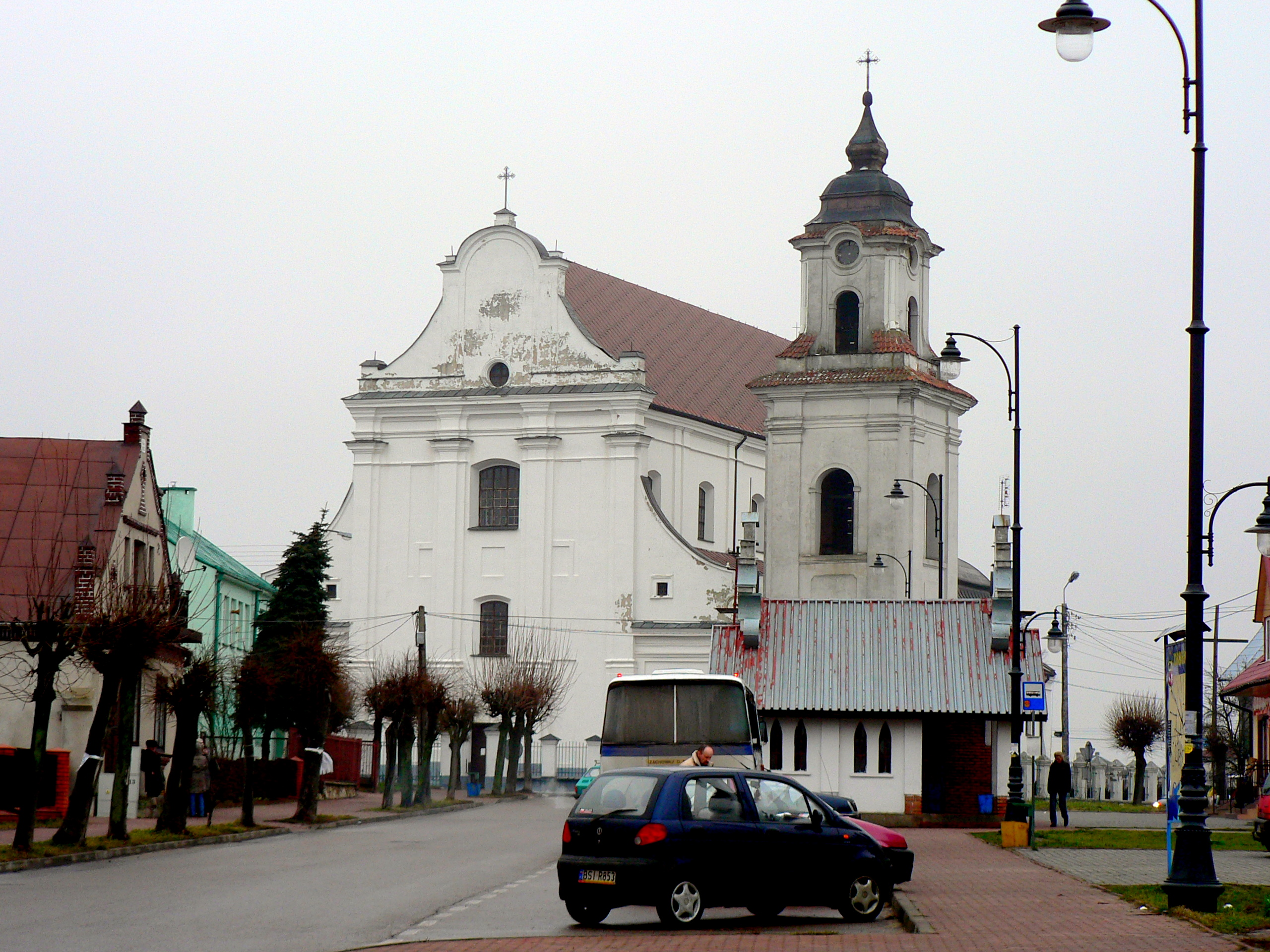 Kościół Wniebowstąpienia NMP w Drohiczynie